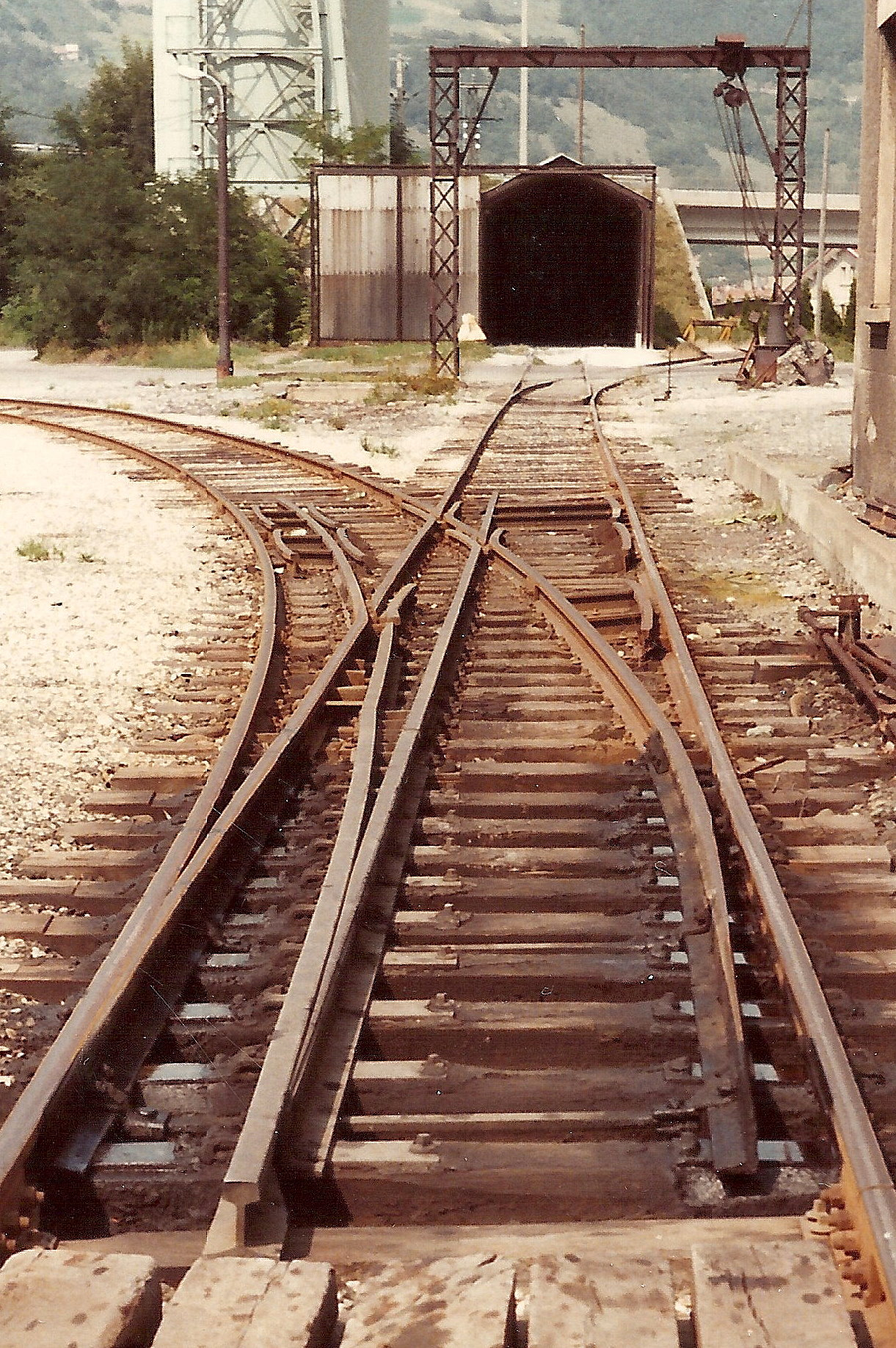 Photo 8. Vizille-Terrasse après la disparition de la voie métrique: les aiguillages complexes à 3 files de rail sont conservés.